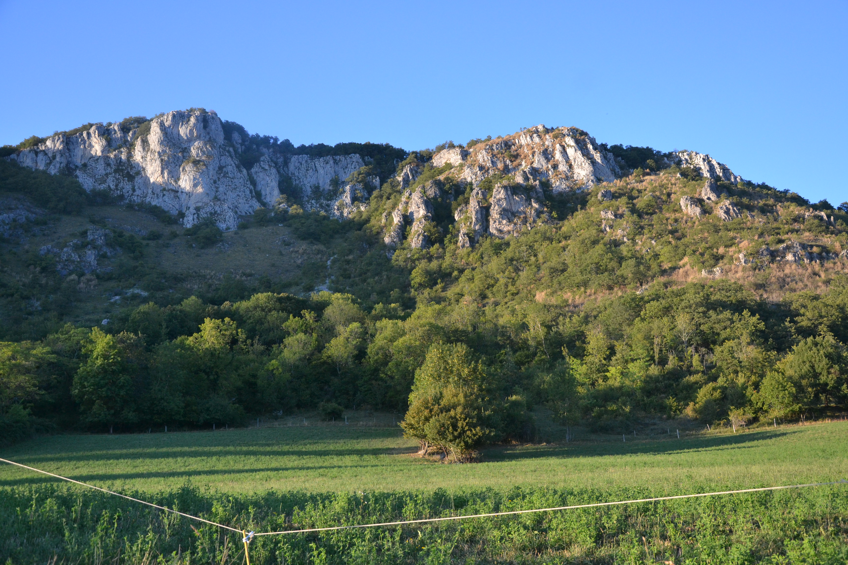 Le pic de l'Aspre, point culminant du Plantaurel (Ariège, France).